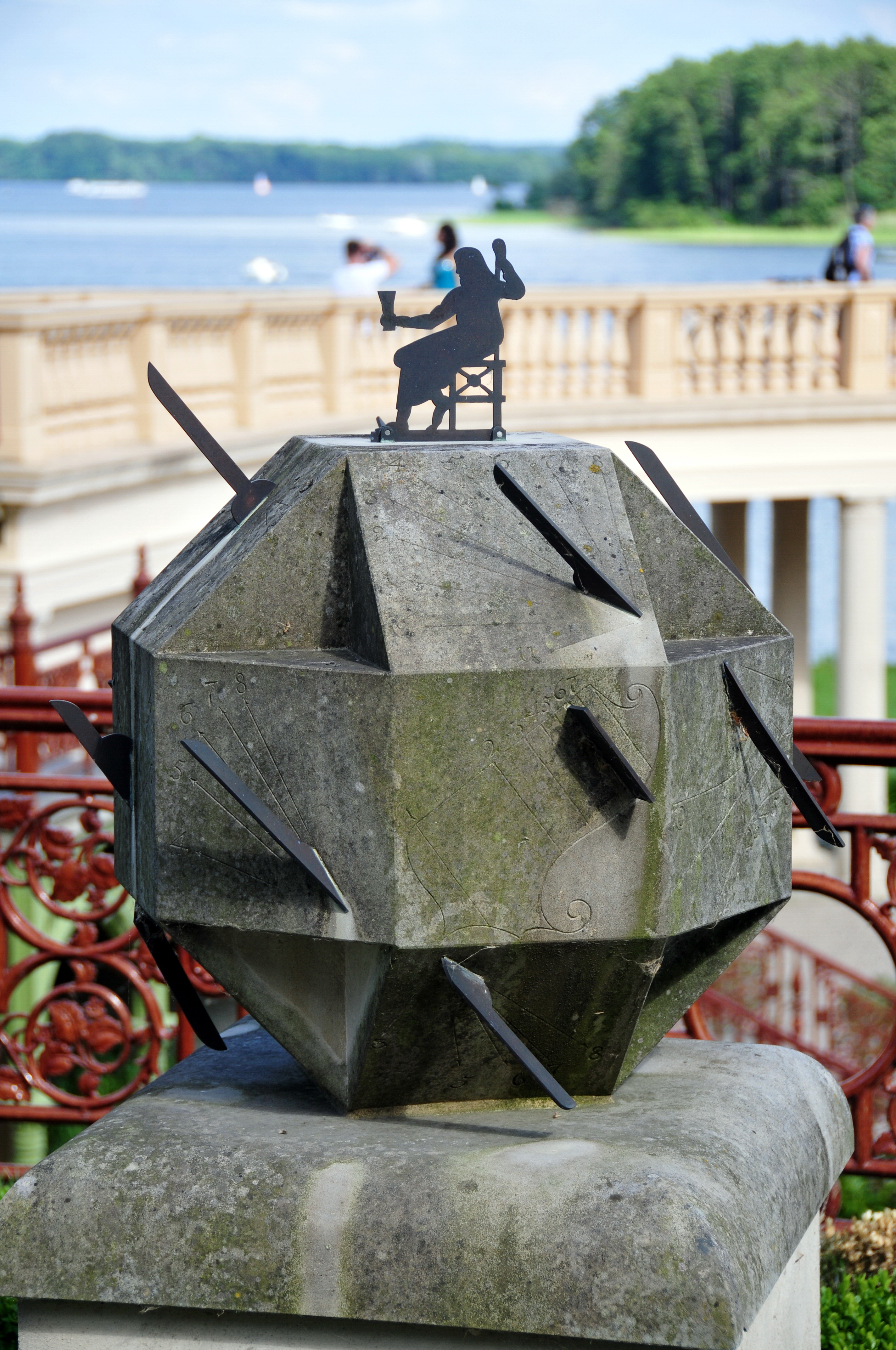 Schwerin; mit 50mm Brennweite von der Orangerie zum Bahnhof Das ist eine Sonnenuhr. Glücklicherweise steht es dran.